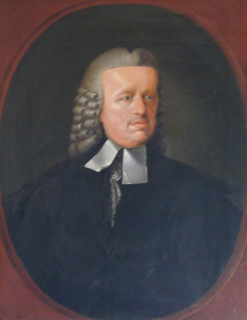 Prof. Johann Friedrich LeBret (Öl auf Leinwand, 76,5 cm x 59,5 cm; Tübinger Professorengalerie)